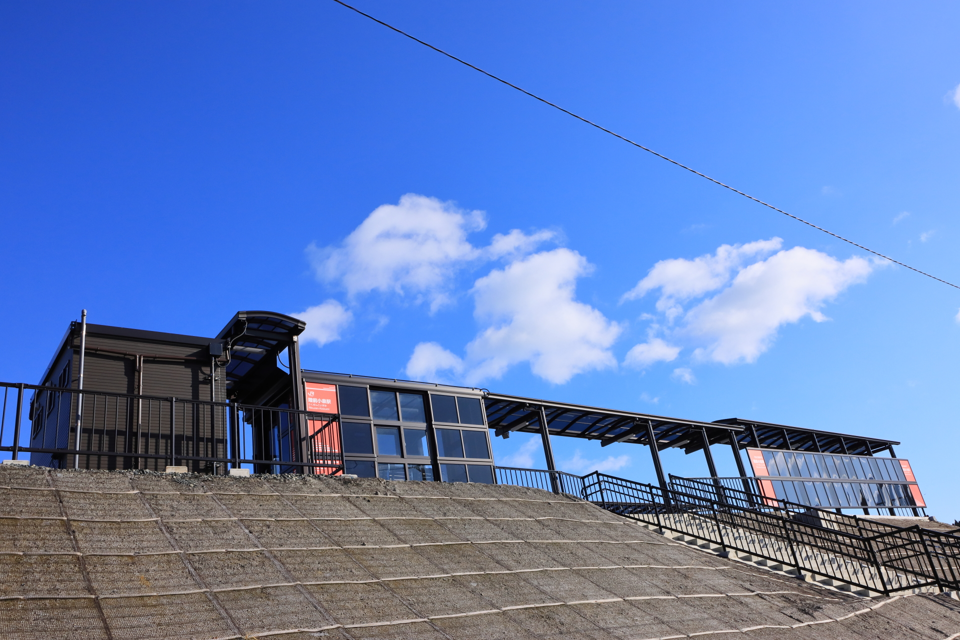 JR東日本・気仙沼線BRTの陸前小泉駅。宮城県気仙沼市に所在。